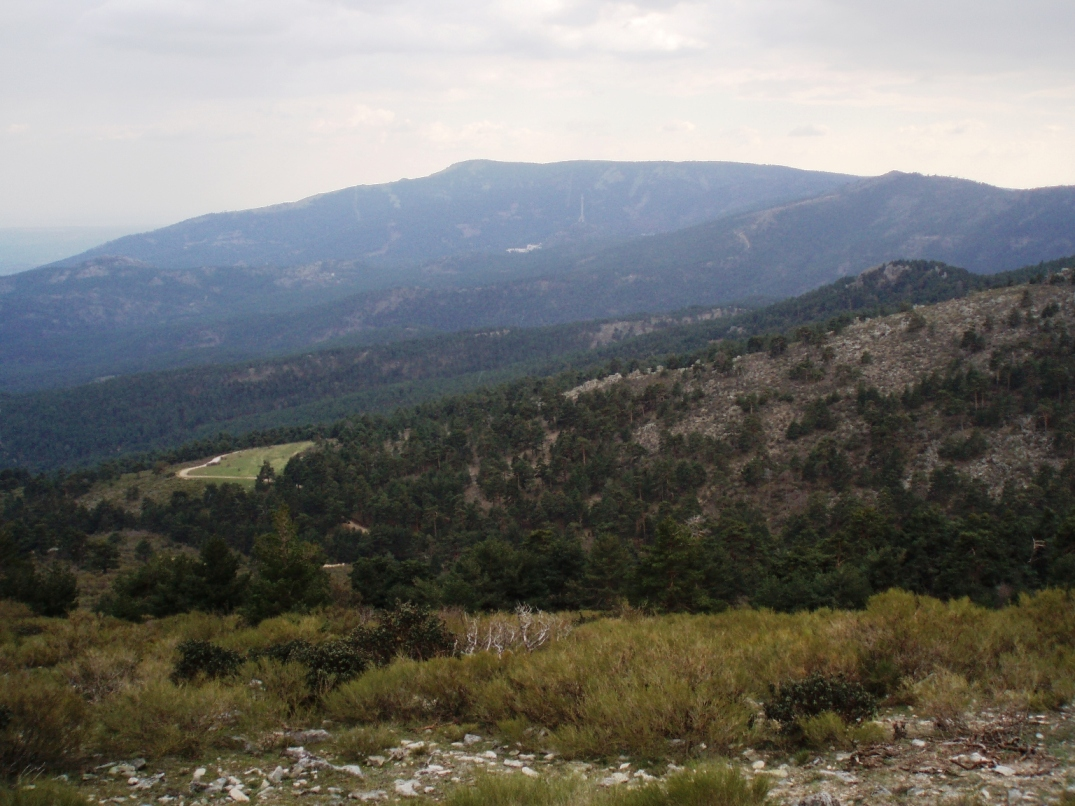 Vertiente norte de Abantos (1.953 m), pico de la Sierra de Guadarrama (centro de España).